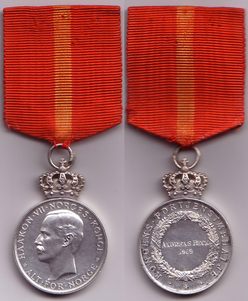 Kongens fortjenstmedalje i sølv gitt til Andreas Beck